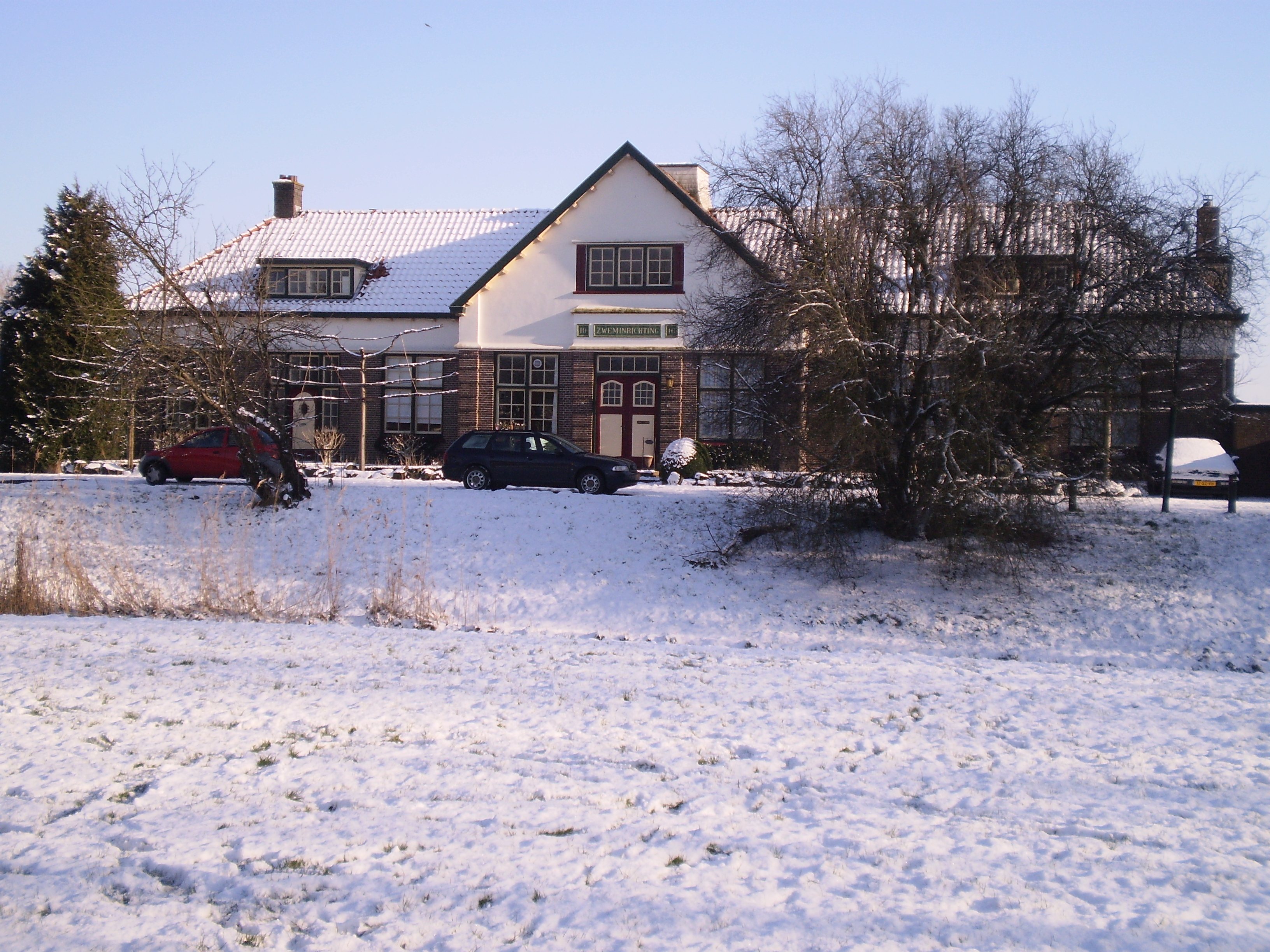 Natoerswimbad Baarn